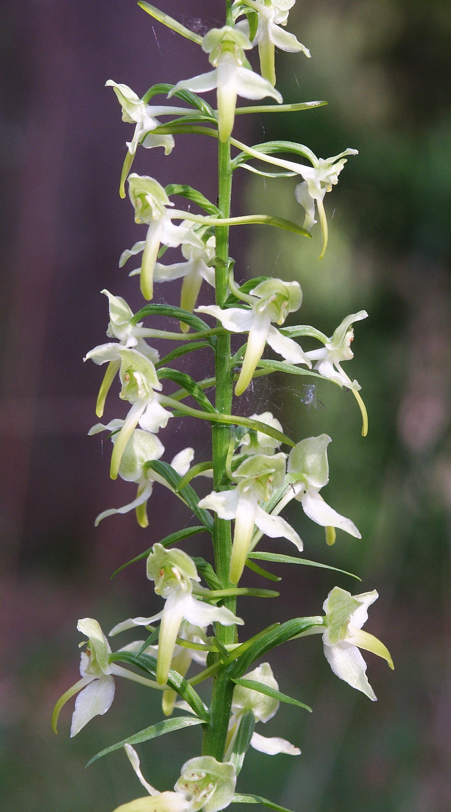 Platanthera chlorantha, Schwäbisch-Fränkische Waldberge, Germany